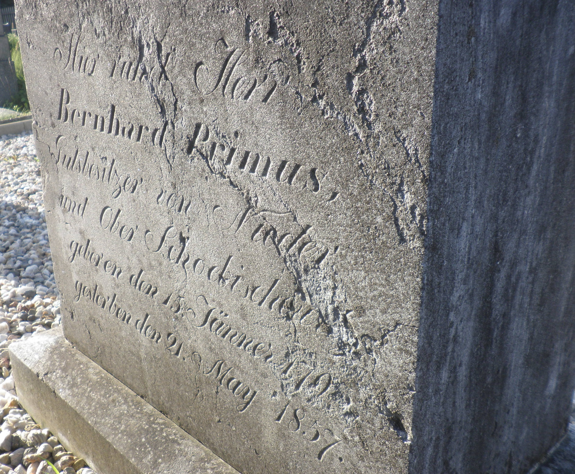 Detail náhrobku Bernarda Primuse (1793-1857), držitele Soběšovic